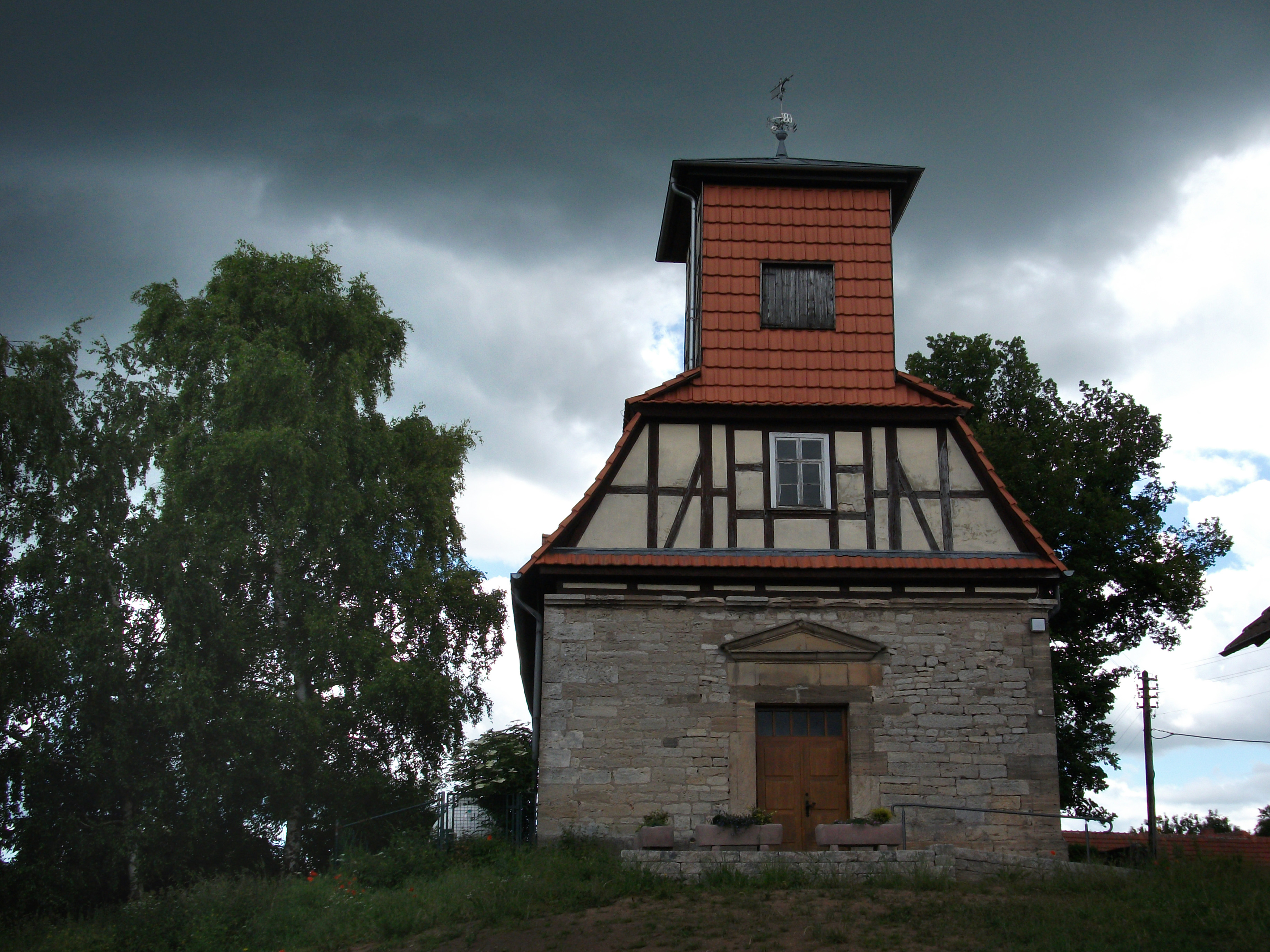 Lüderbach, Gemeinde Ringgau im nordhessischen Werra-Meißner-Kreis. Die evangelische Pfarrkirche des Ortes wurde zwischen 1329 und 1445 erbaut. Im westlichen Teil ist noch romanisches Mauerwerks eines ehemaligen Wehrturms erhalten. Durch Lüderbach führen der Herkules-Wartburg-Radwanderweg, der Werra-Burgen-Steig Hessen (X5H) und der Elisabethpfad.